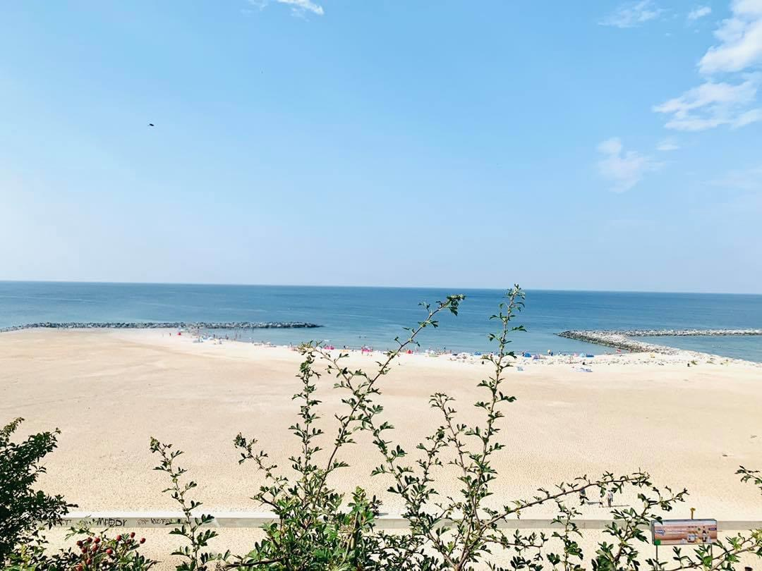 Sztucznie utworzona plaża nad Bałtykiem w Jarosławcu